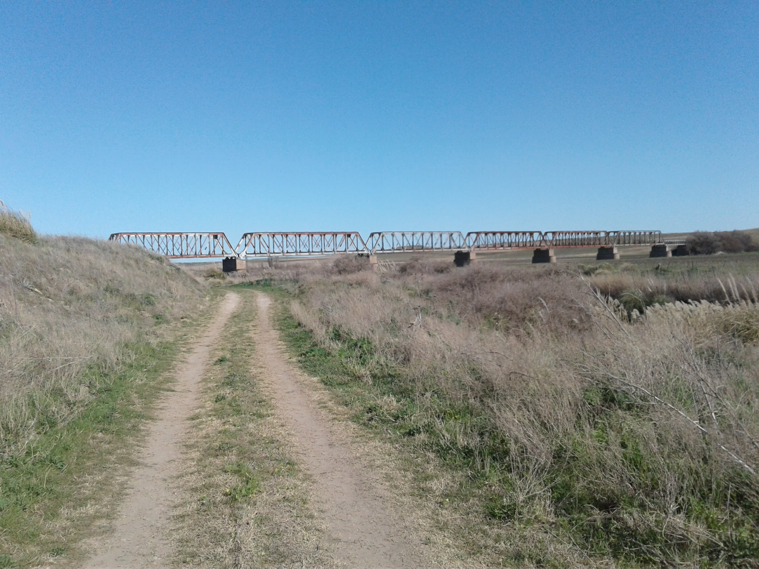 Centenario puente de casi 300 metros sobre el rio Sauce Grande en la Provincia de Buenos Aires